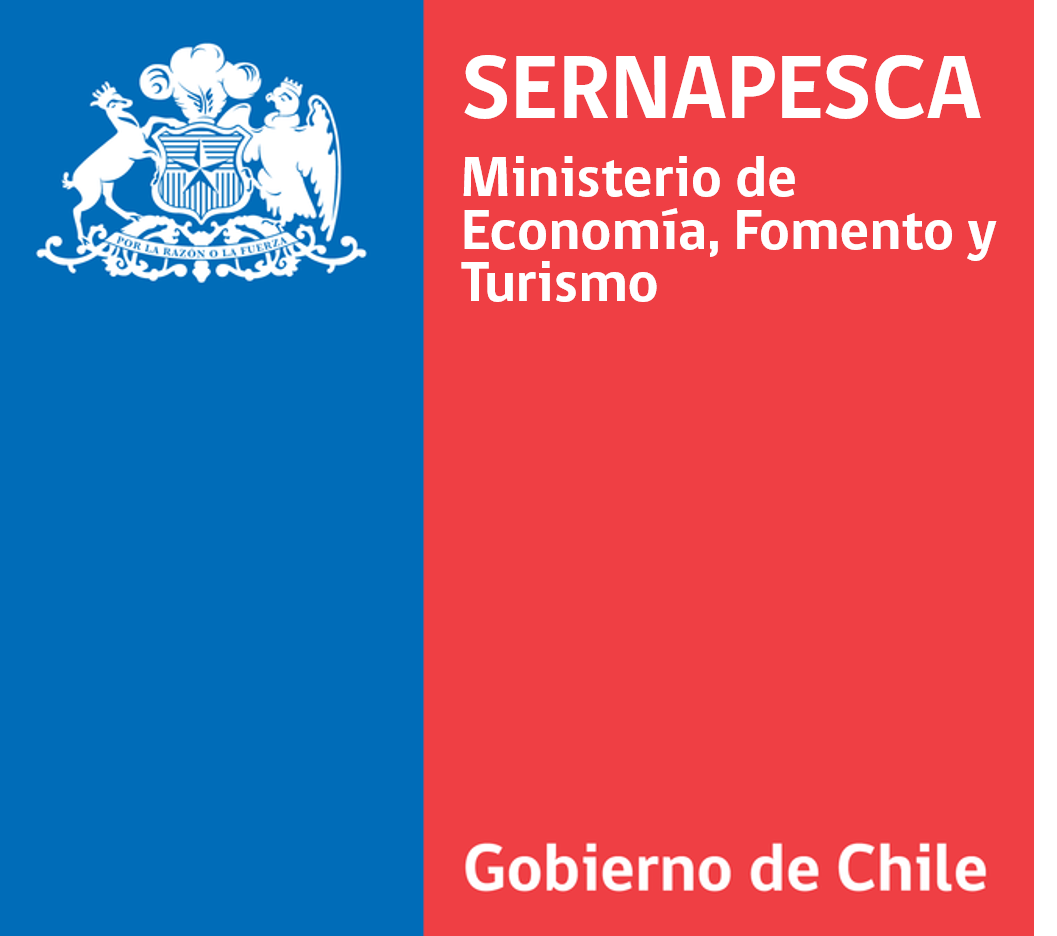 Logotipo Institucional del Servicio Nacional de Pesca y Acuicultura.